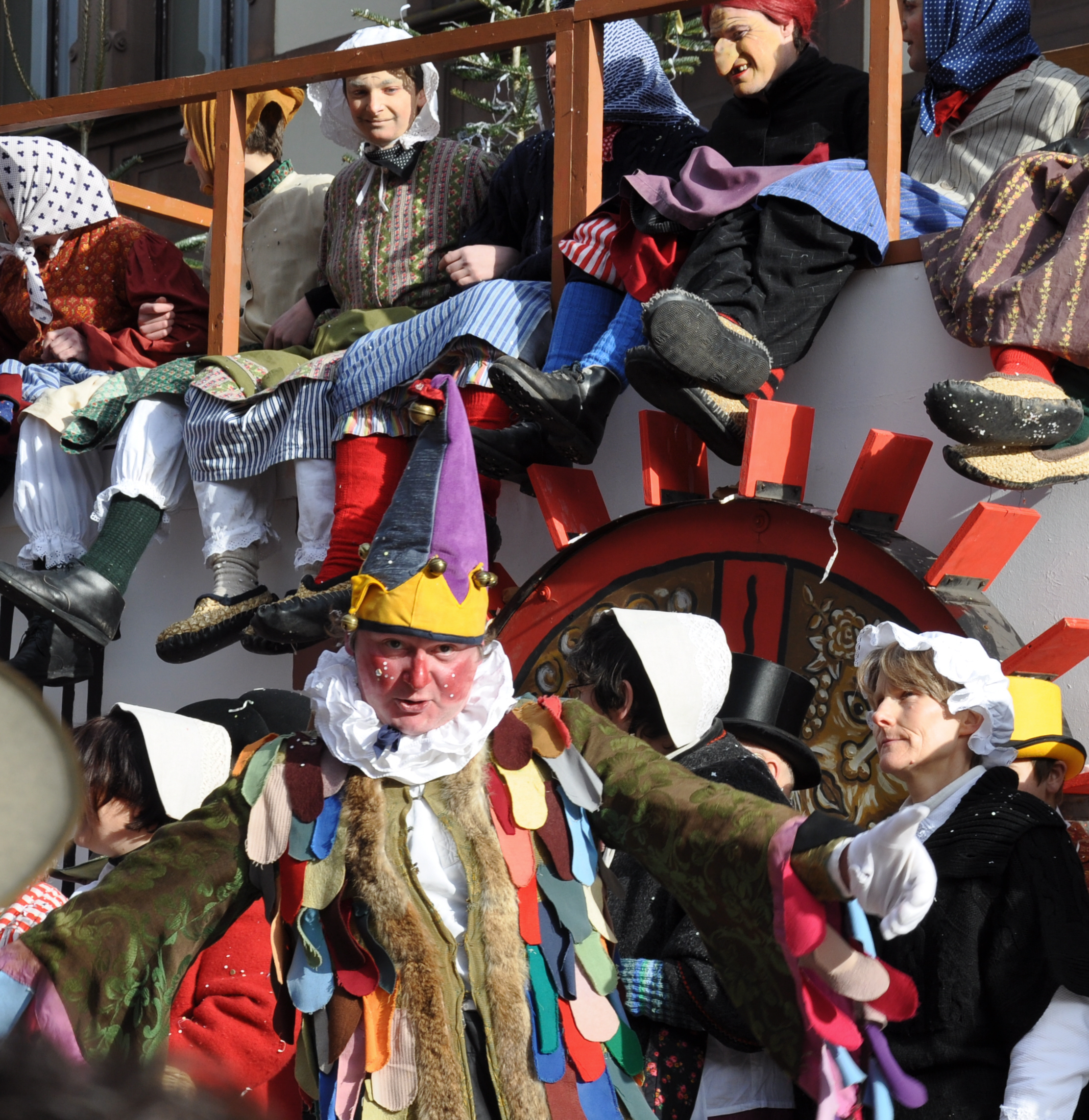 Aufführung des Fasnetspiels Die Weibermühle von Tripsdrill von Georg Anton Bredelin, 1787, bei der Fasnet in Wolfach im Schwarzwald; Fasnetsmontag 2012